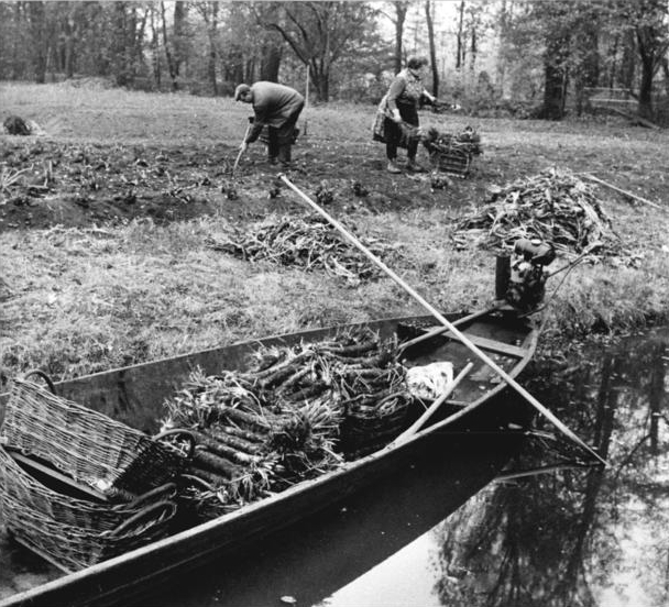 Meerrettichernte im Spreewald ADN-ZB Weisflog 10.11.83-Lag Bez.Cottbus: Meerrettichernte- Der Spreewald ist das traditionelle Anbaugebiet von Meerrettich. Wie viele Familien baut auch die von Werner Schipps das beliebte Wurzelgemüse an. Per Kahn bringt sie es zur Aufkaufstelle. siehe auch 1983-1110-2N, 4N